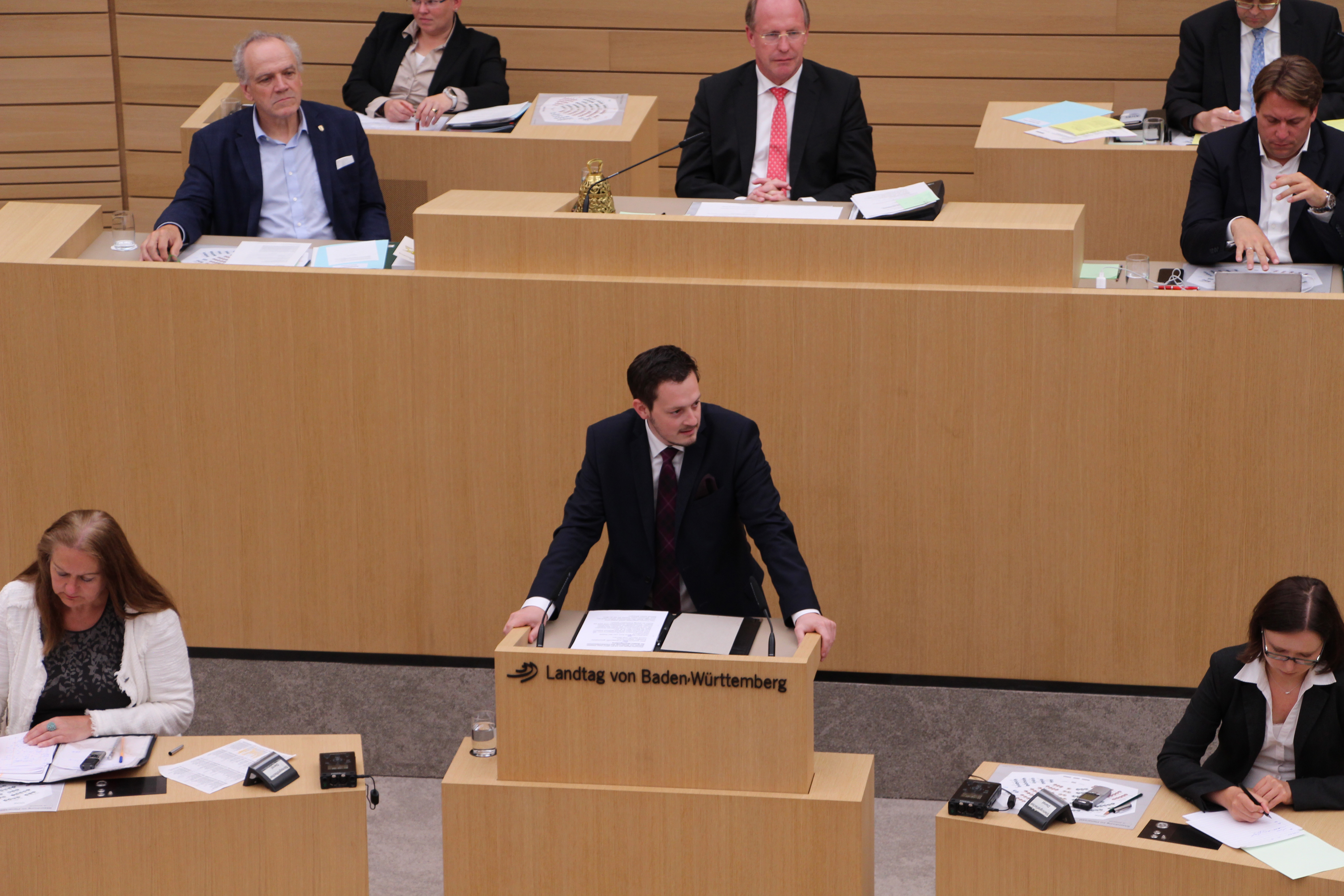 Stefan Herre im Plenum des Landtags Baden-Württemberg